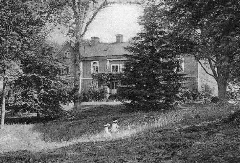 Bönsta gård i Helgona socken på ett äldre vykort (beskuren)